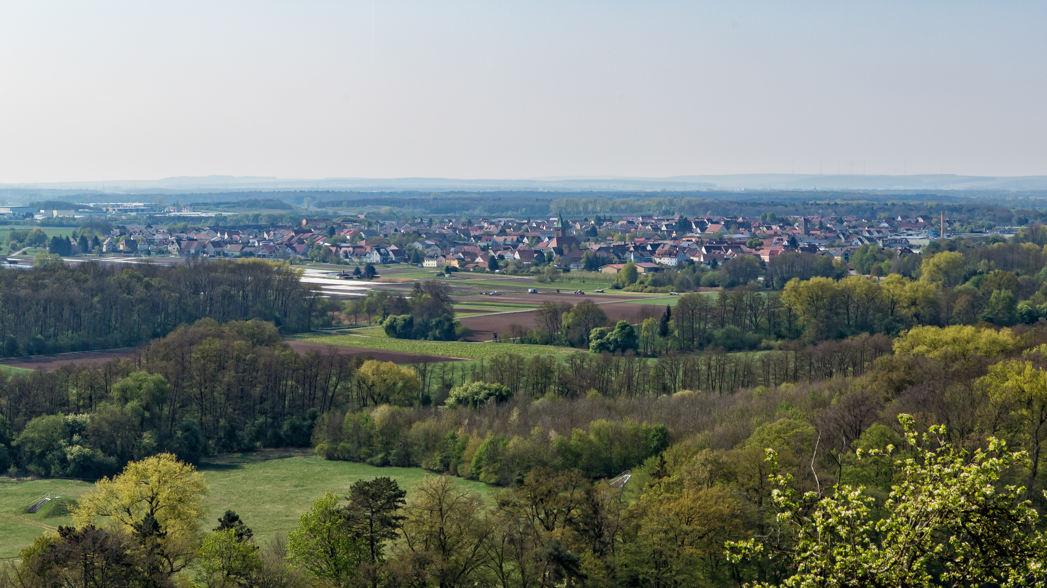 Blick von der Peterstirn auf Sennfeld, 2017